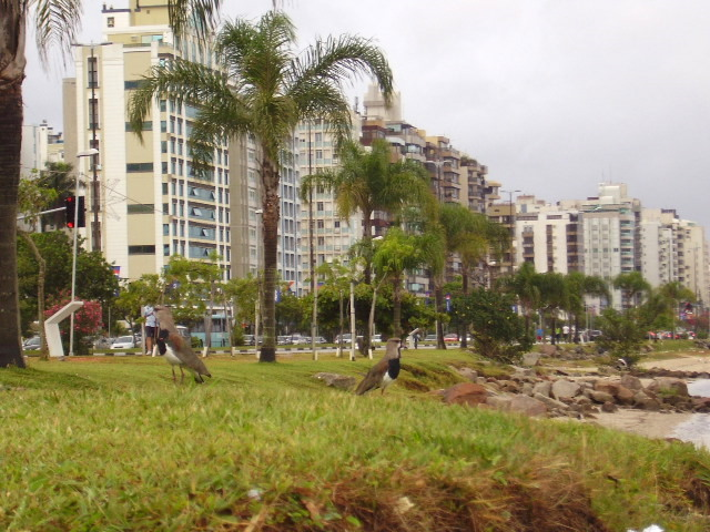 Defensa costera de Florianópolis.